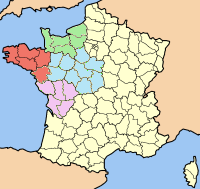 La proposition d’Yves Le Rhun de réorganisation administrative du nord-ouest de la France (ancienne proposition parlementaire de 2009, non retenue pour les régions administratives de 2016). La région « Centre » (renommée « Centre-Val de Loire » depuis janvier 2015) et la région « Pays de la Loire » auraient fusionné en une région « Val de Loire » (en bleu sur la carte), à l’exception du département de la Loire Atlantique, retrouvant la région Bretagne (en rouge sur la carte), et du département de la Vendée, rejoignant la région Poitou-Charentes (en rose sur la carte). En revanche la proposition de fusion des deux régions normandes (en vert sur la carte) a été retenue et entrera en vigueur en 2016.